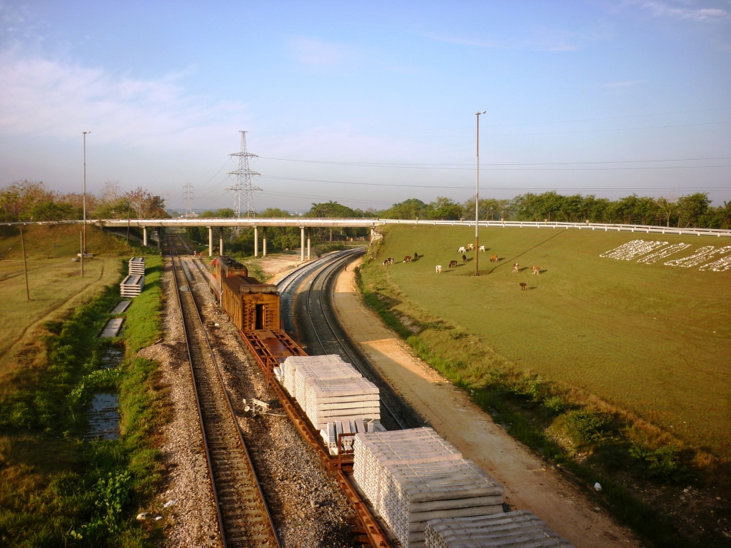 Ferrocarril Habana-Mariel, Entroque con Línea Sur en el paso elevado de 100 y Boyeros